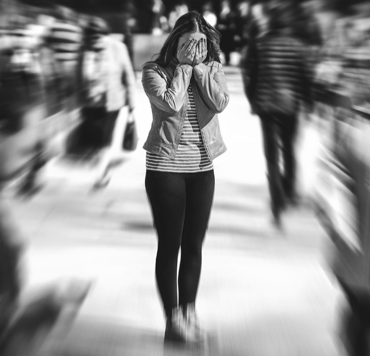 Enoclofobia